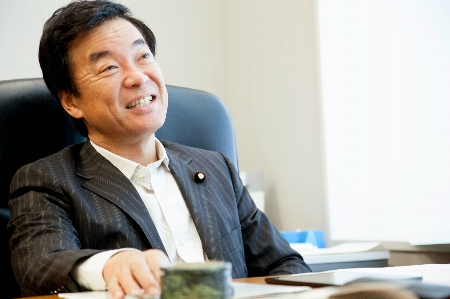 日本史必修化についてコメントする松沢成文